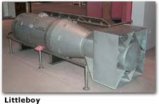 Afbeelding gekopieerd vanaf Wikipedia-de. De beschrijving daar was:1:1 Modell der Little-Boy Bombe von Copyright notice: Unless otherwise indicated, this information has been authored by an employee or employees of the University of California, operator of the Los Alamos National Laboratory under Contract No. W-7405-ENG-36 with the U.S. Department of Energy. The U.S. Government has rights to use, ...................................reproduce, and distribute this information. The public may copy and use this information without charge, provided that this Notice and any statement of authorship are reproduced on all copies. Neither the Government nor the University makes any warranty, express or implied, or assumes any liability or responsibility for the use of this information.